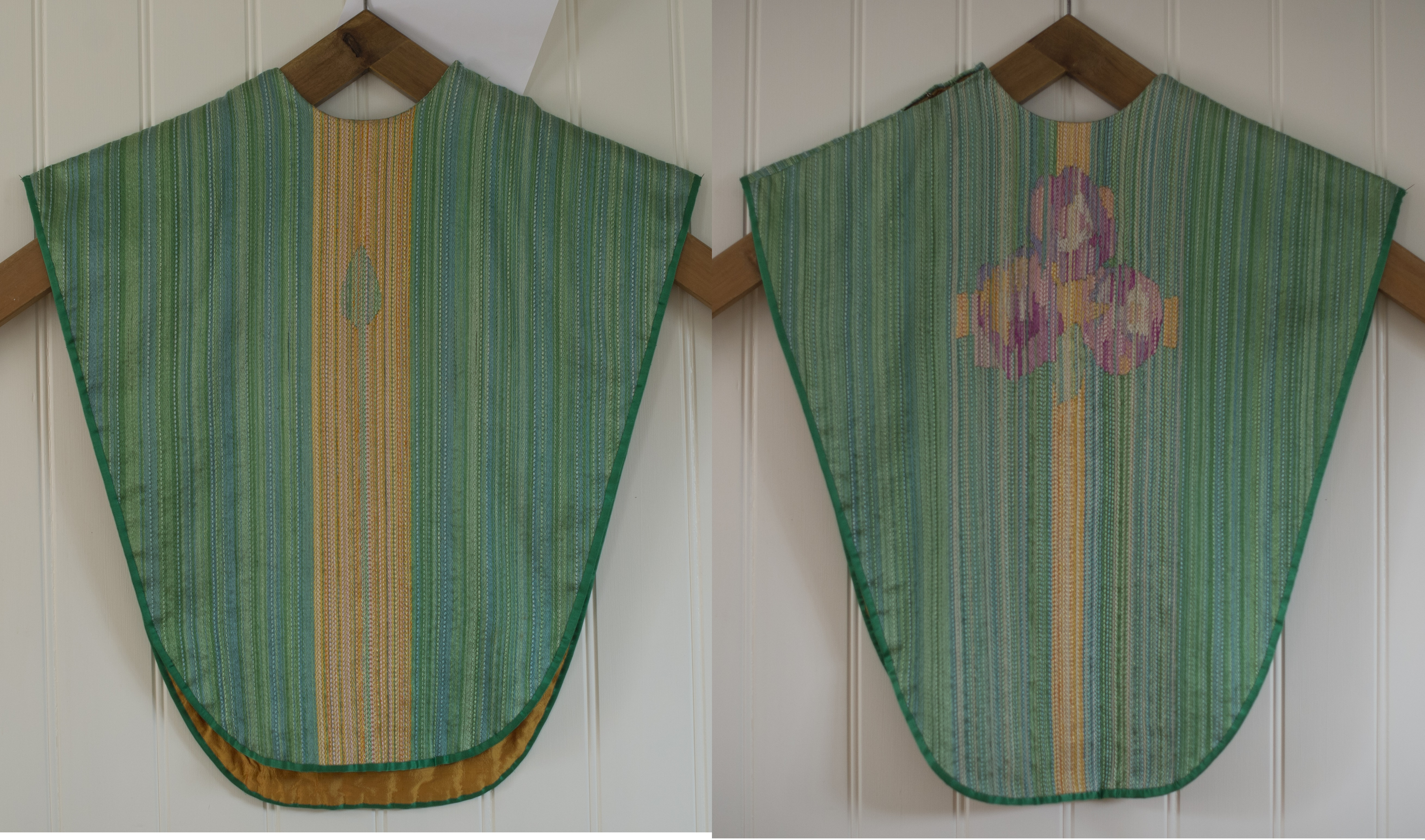 Grønn messehagel fra Nidaros domkirke - Grete L Lange (1986)